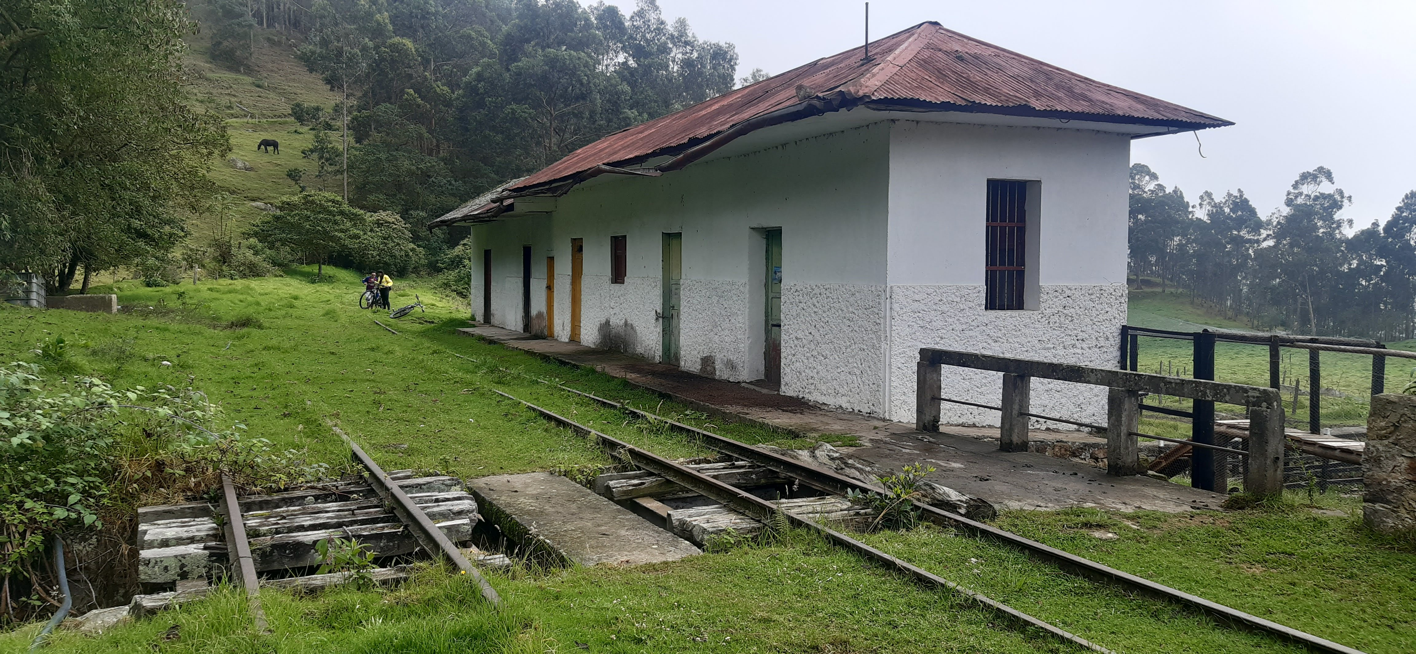 parte posterior de la estación de Sebastopol municipio de Zipacon